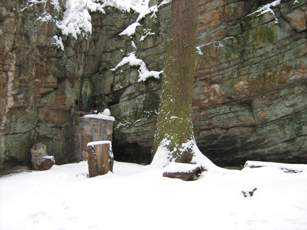 Lurdská jeskyně (poutní místo) na Rejvízu